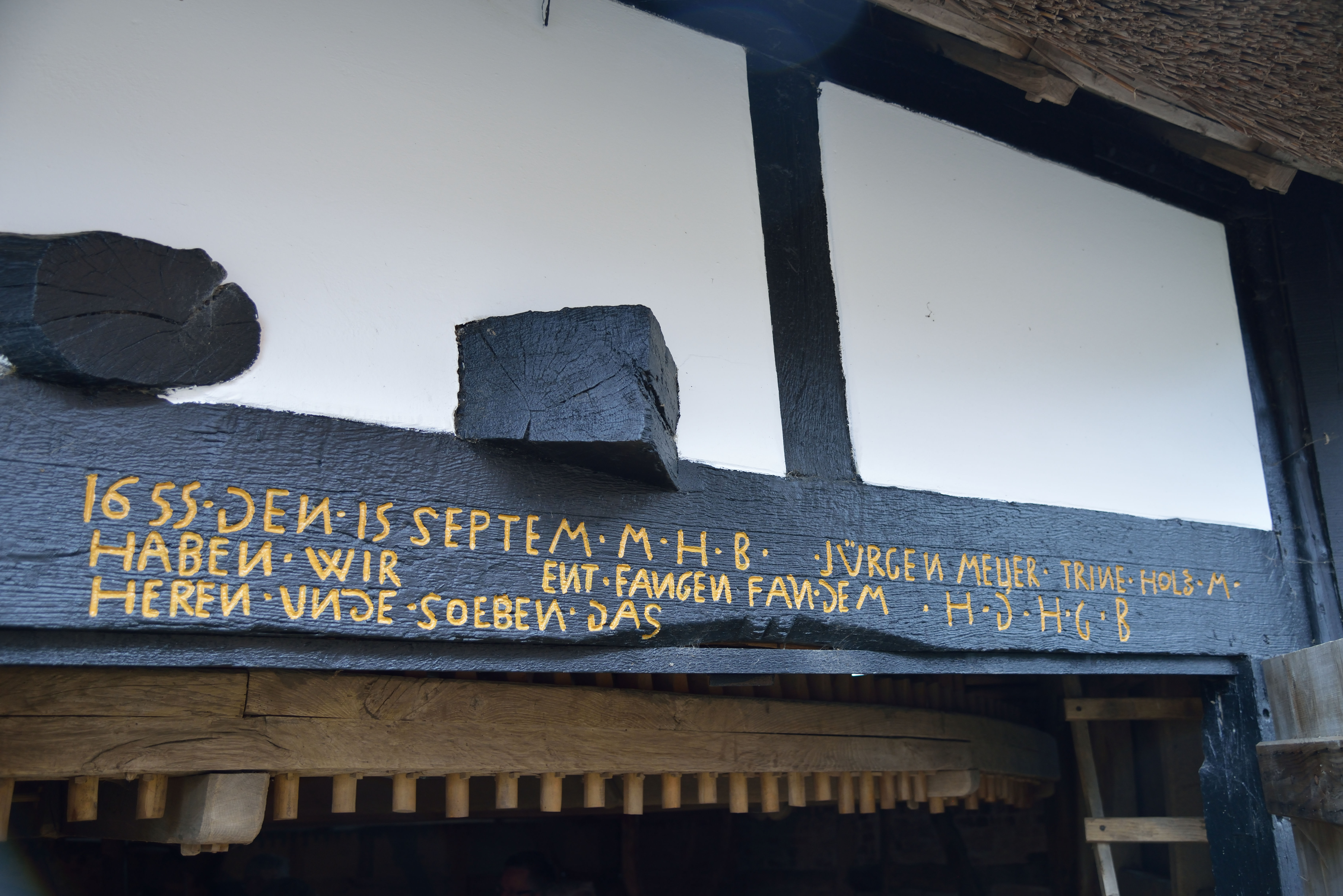 Rossmühle Oberbauerschaft in Duitsland, rosmolen, opschrift boven ingang rosmolen